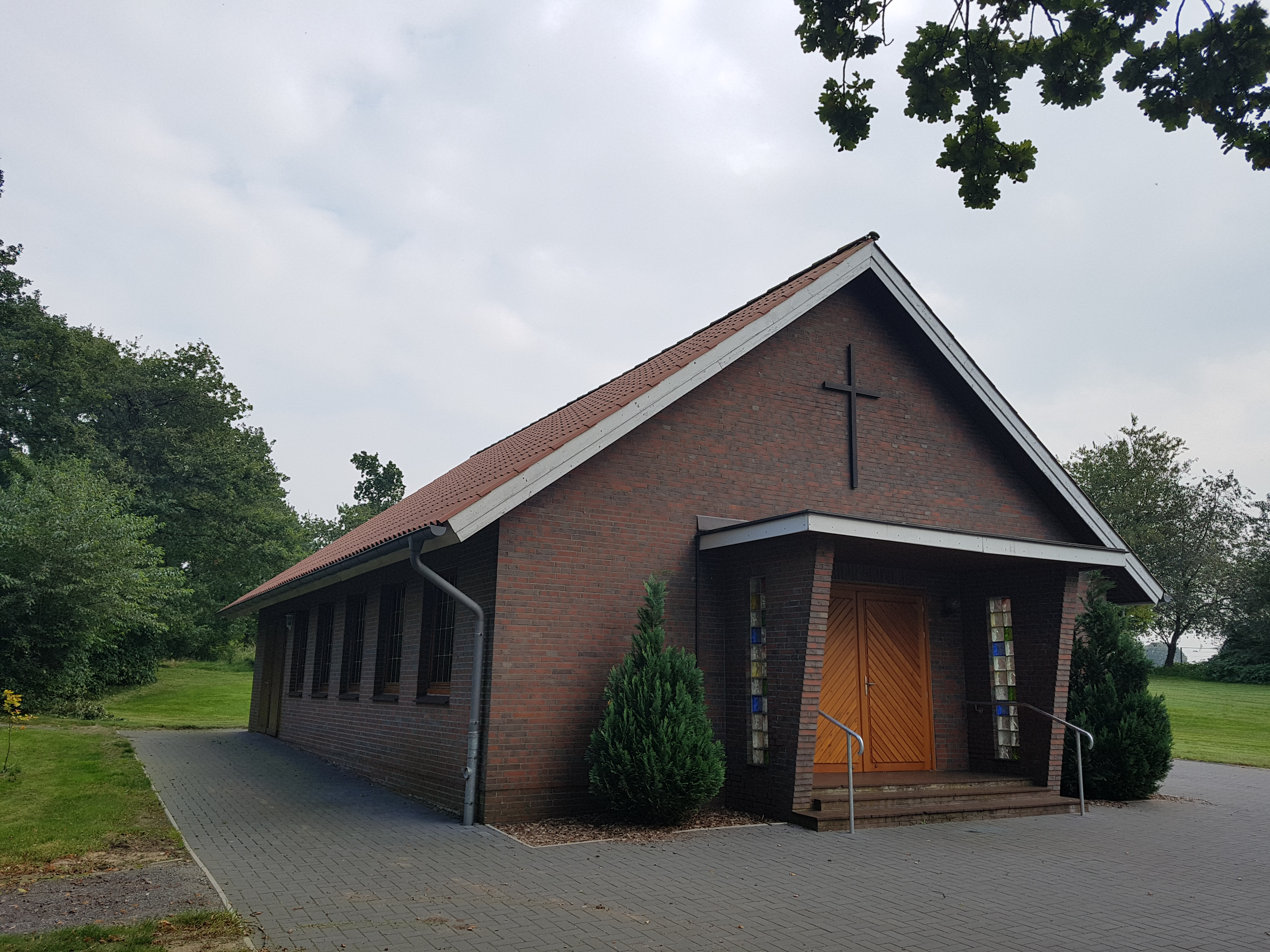 Kapell an’n Karkhoff in Hollen